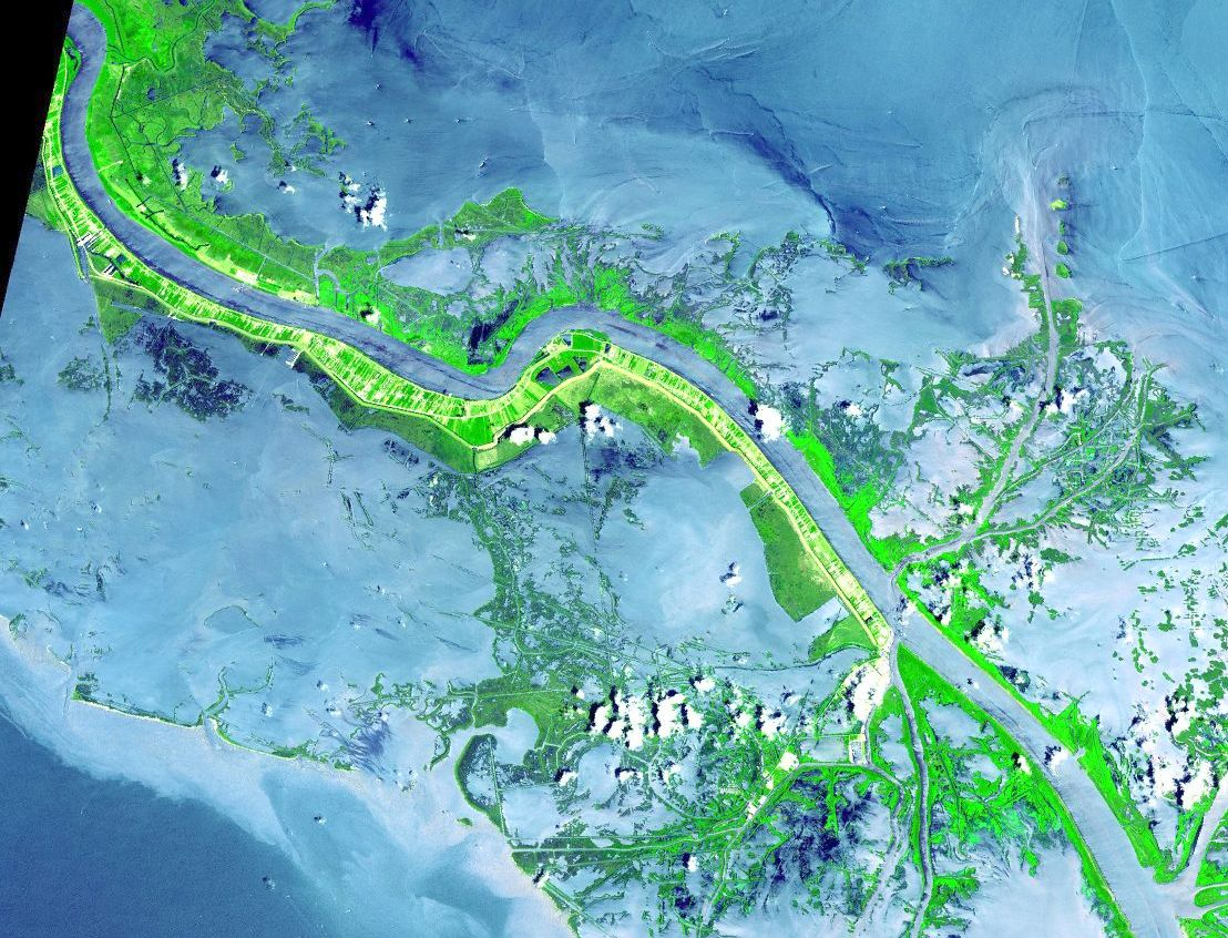 Selección de una parte de la imagen original de la NASA para resaltar una zona del Delta antes del huracán Katrina (2005)